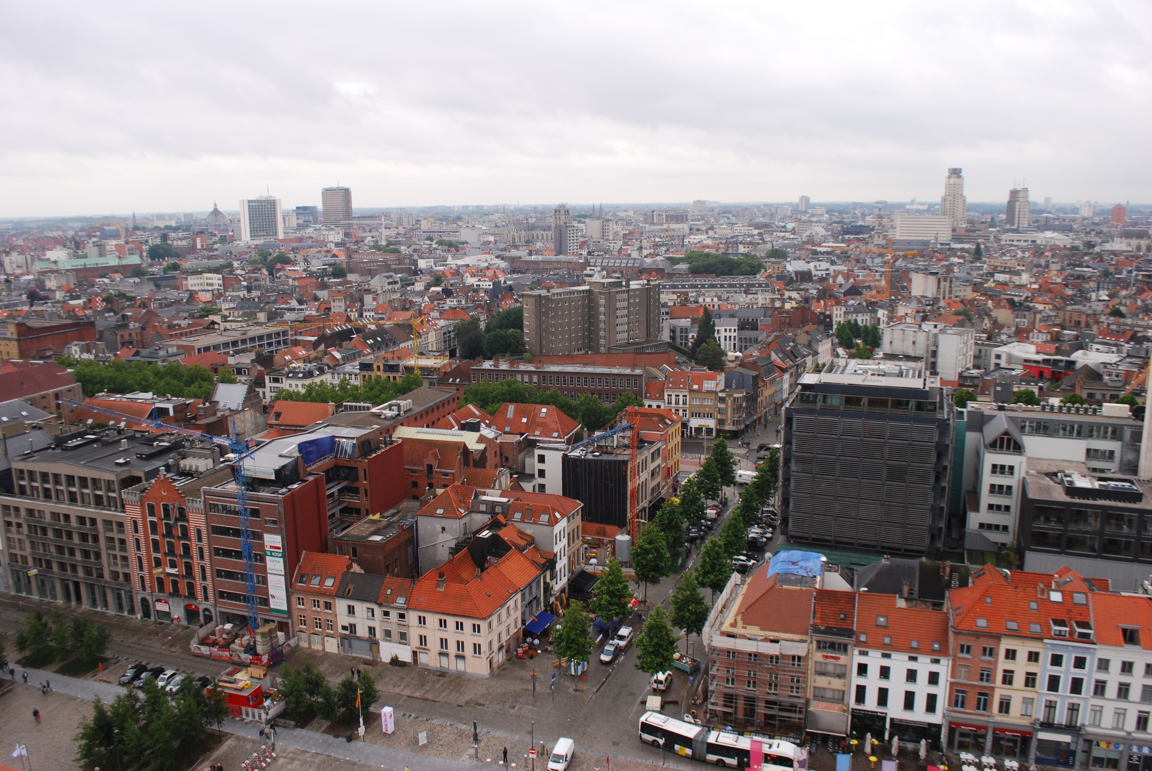 Vue sur le quartier au sud de Bonapartedok à Anvers.